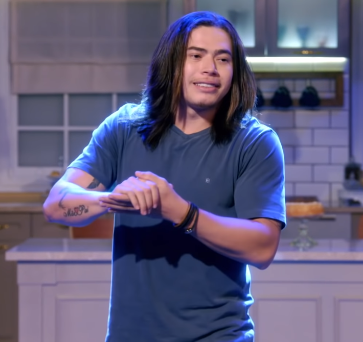 Whindersson Nunes em seu programa de humor, Os Roni, exibido pelo Multishow.